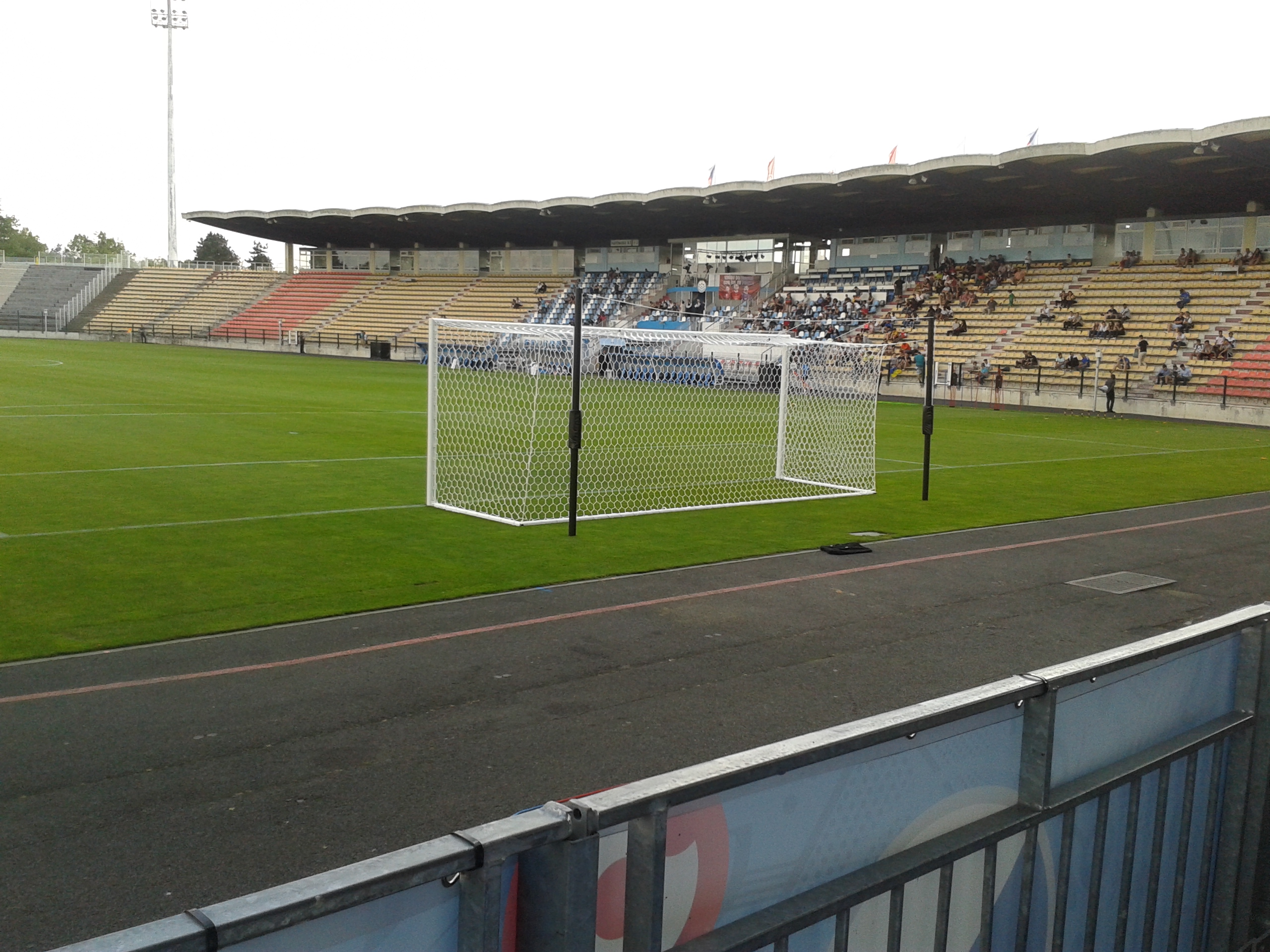 Photographie de la tribune Honneur du stade de la Vallée du Cher, à Tours, lors de l'Euro 2016, le 8 juin 2016.